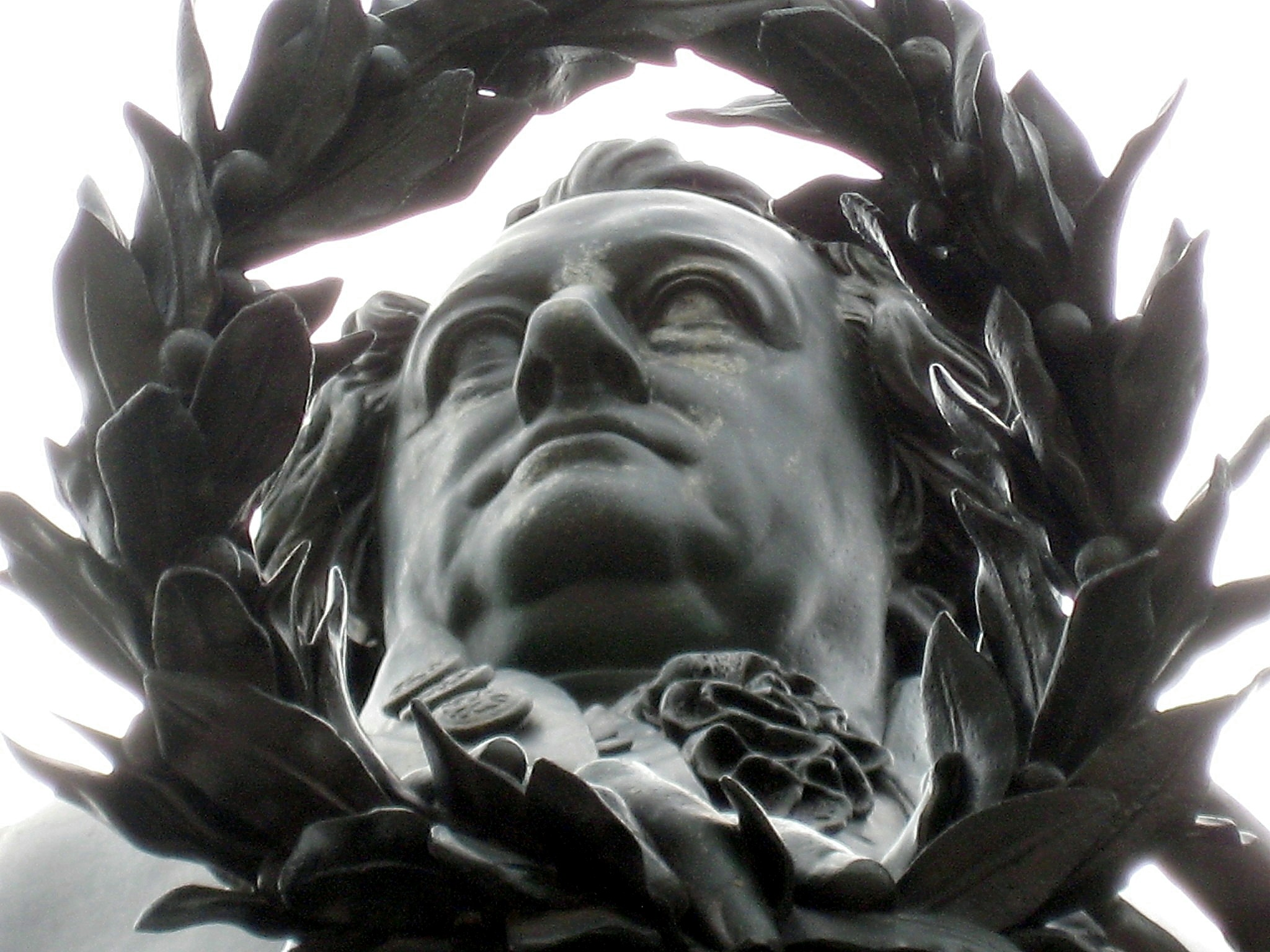 Goethe (Denkmal in Weimar)